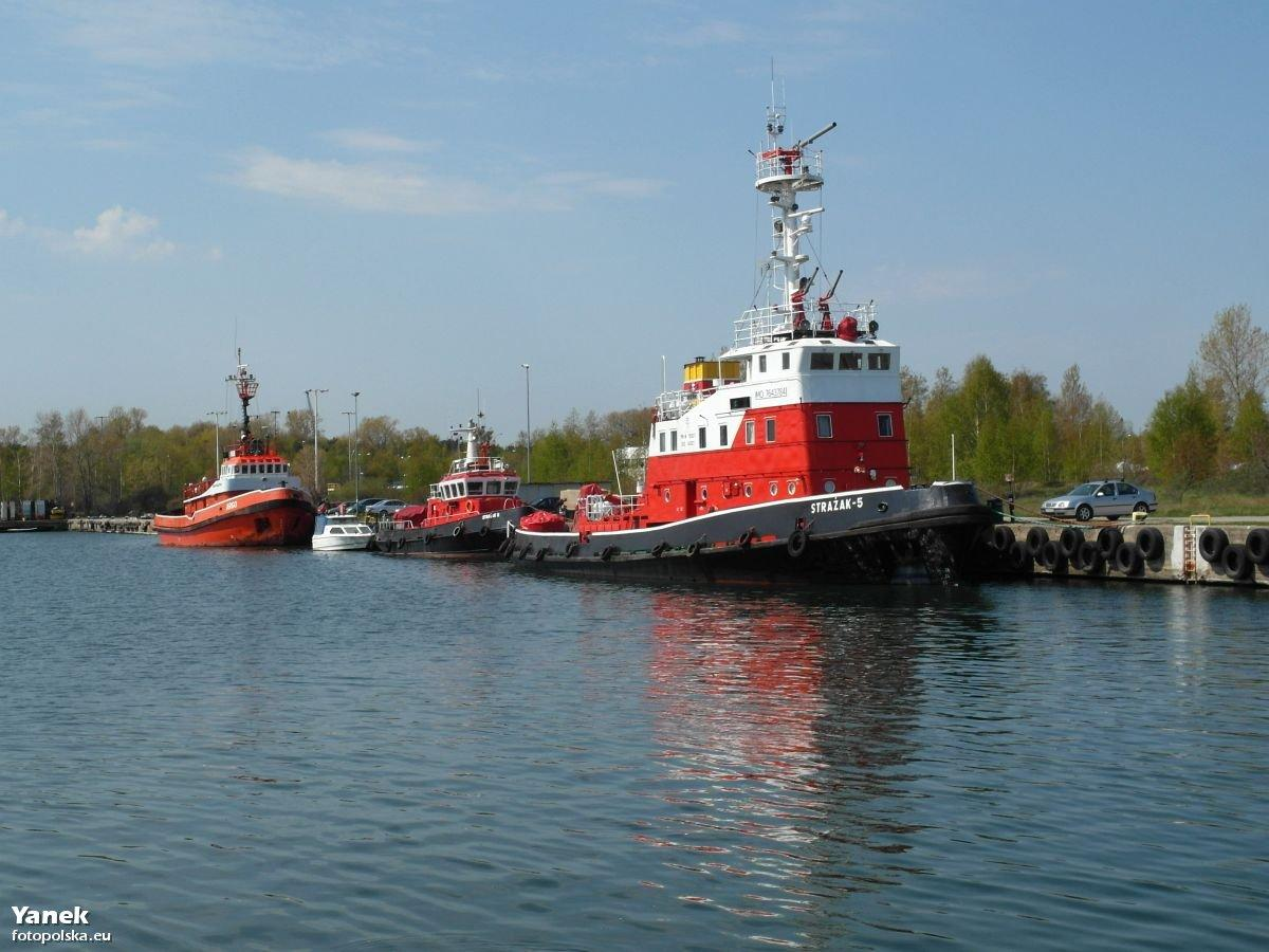 Pływające jednostki gaśnicze przy Nabrzeżu Północnym, Portu Północnego (m.in. Strażak 5).